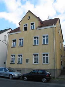 Elternhaus des Abbé Franz Stock